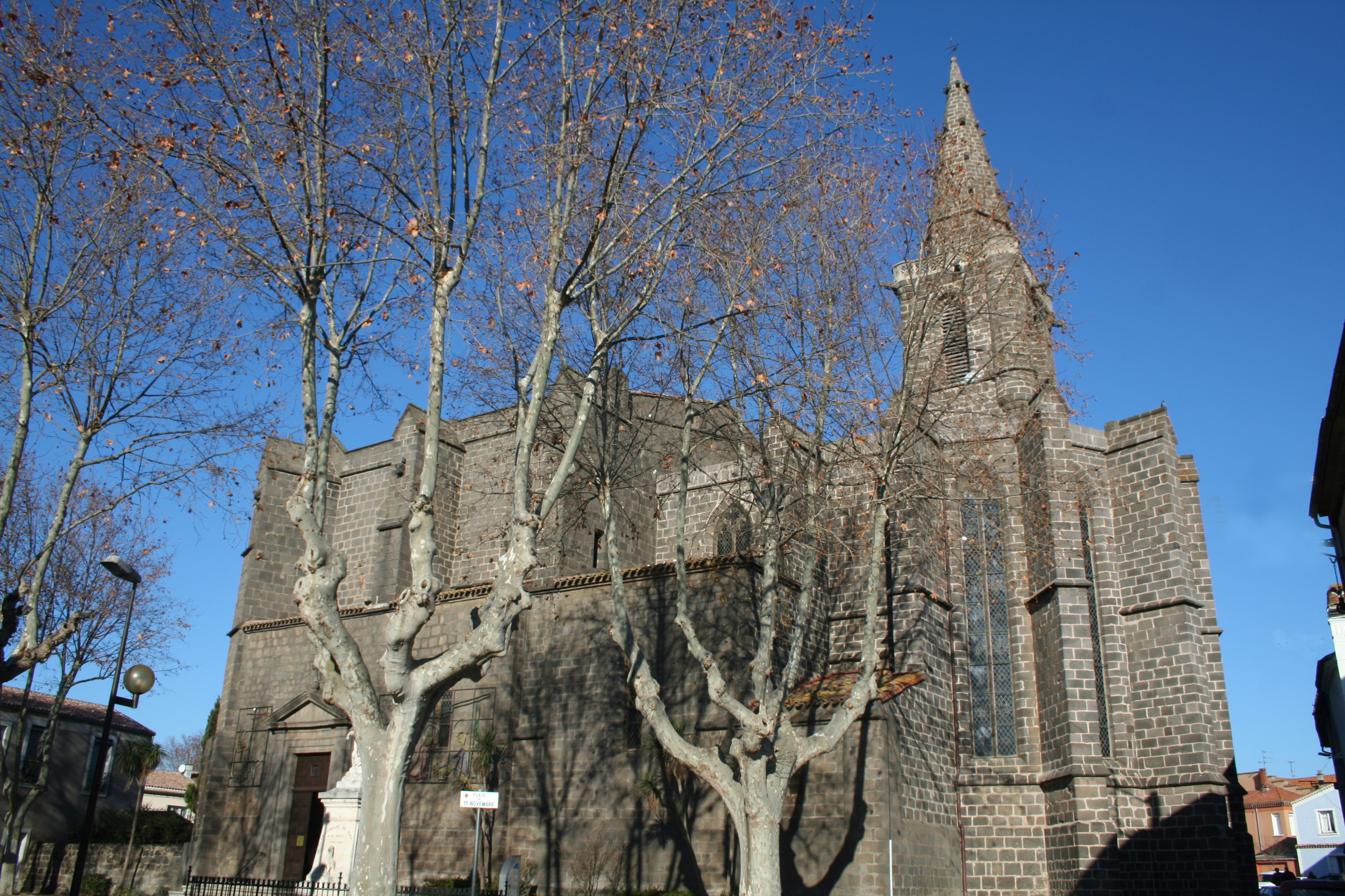 Vias (Hérault) - Façade sud de l'église Saint-Jean-Baptiste (XIVe - XVe siècles).